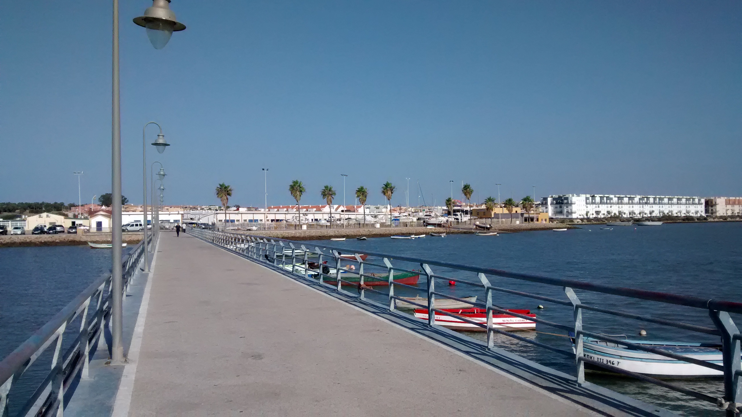 Muelle de Gallineras en San Fernando de Cádiz